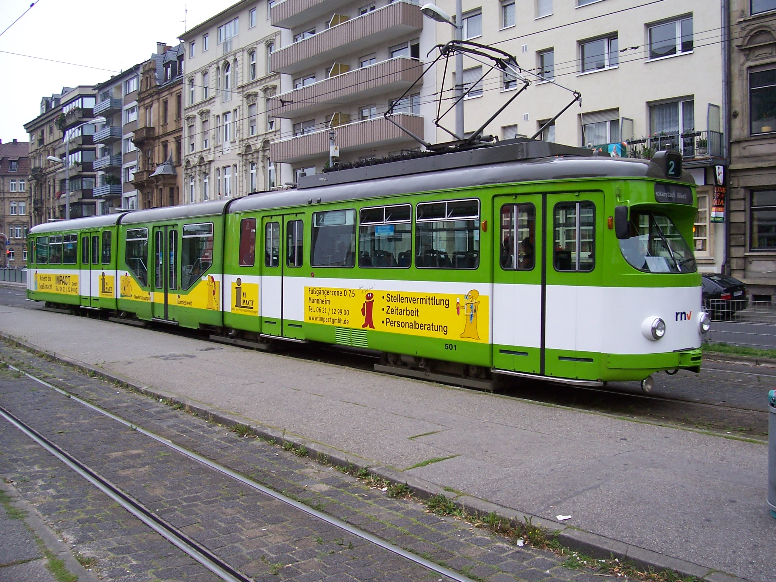 Duewag Gt8 an der Haltestelle Nationaltheater in Mannheim